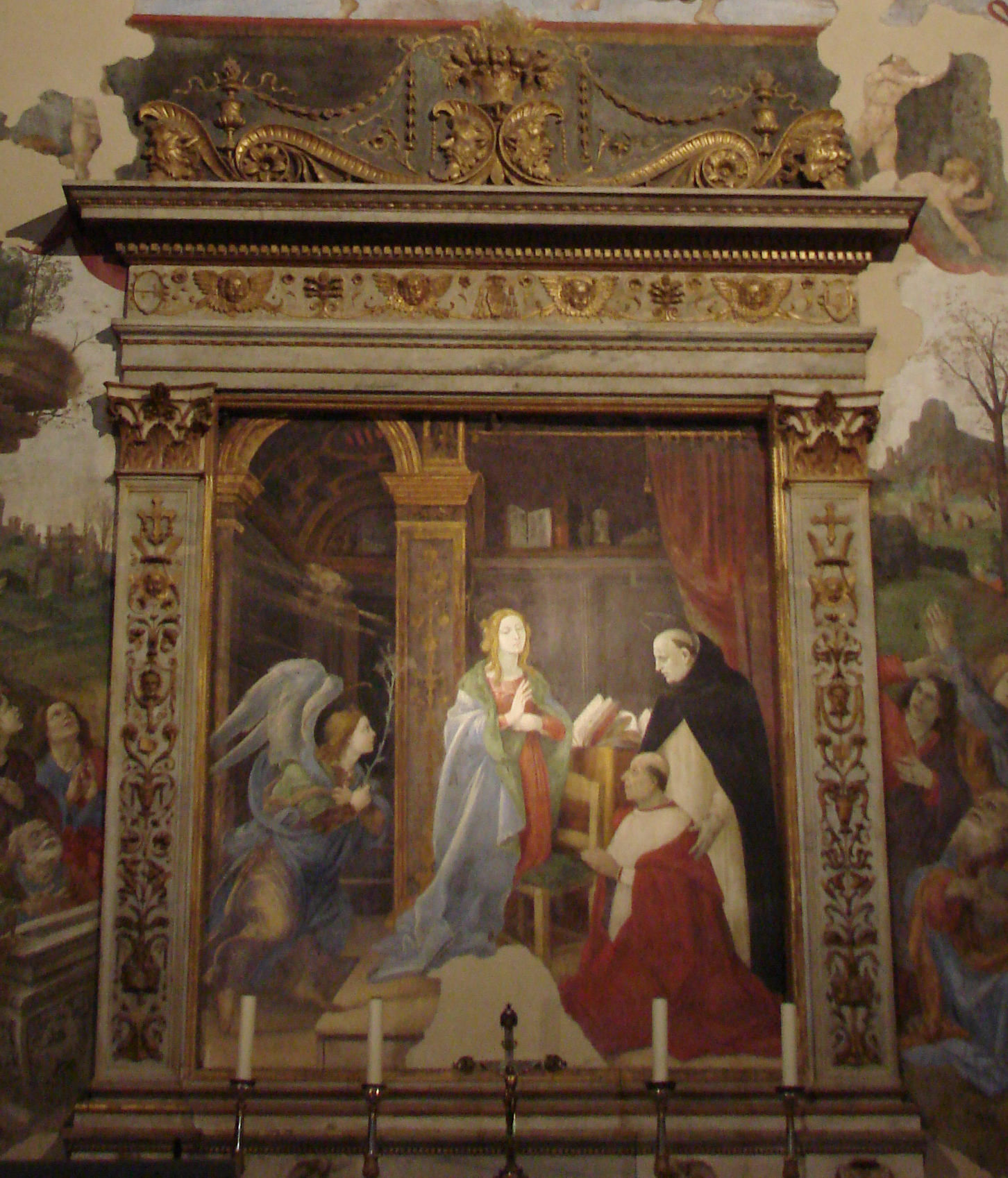 Cappalla carafa 07 annunciazione